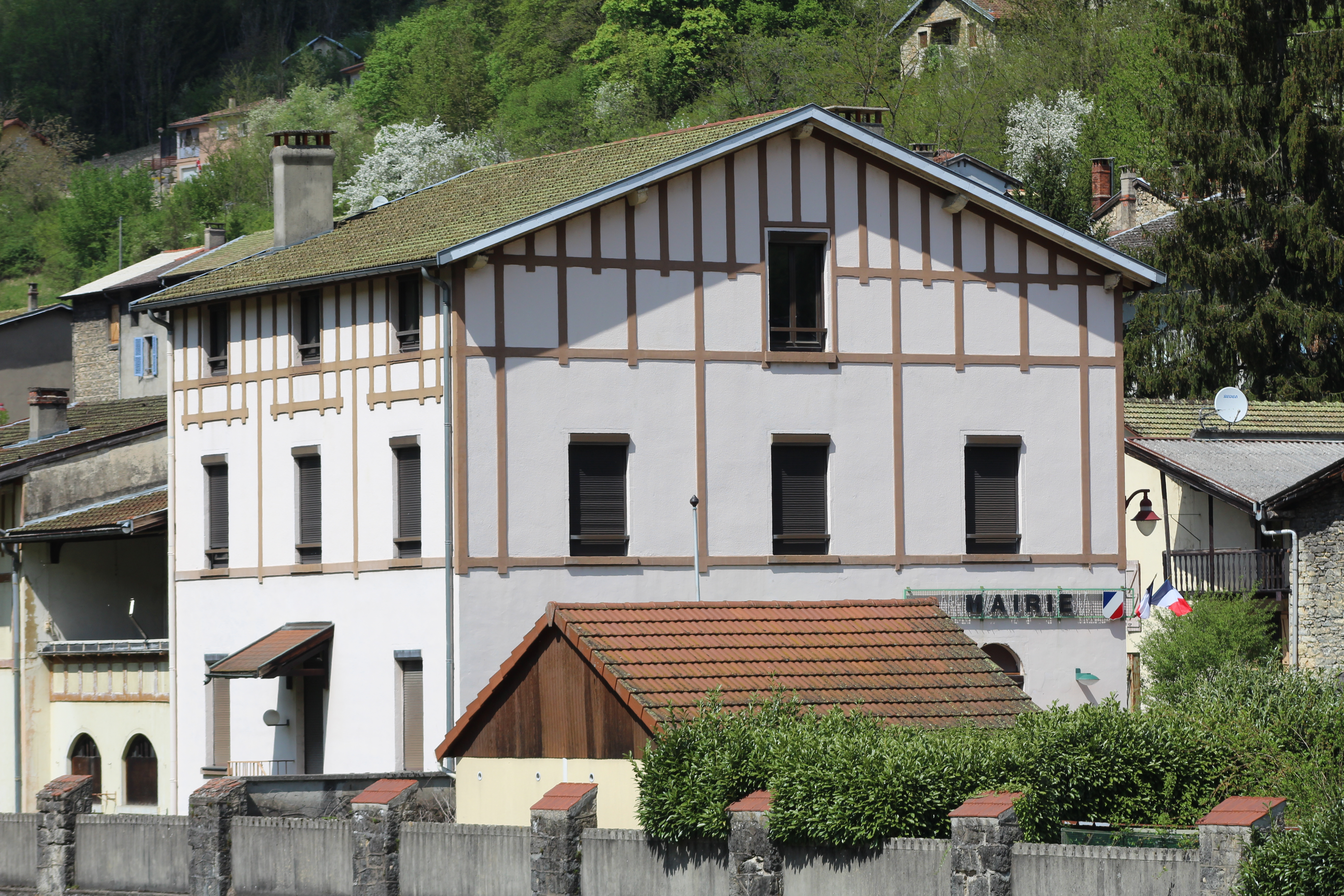 Mairie d'Argis.